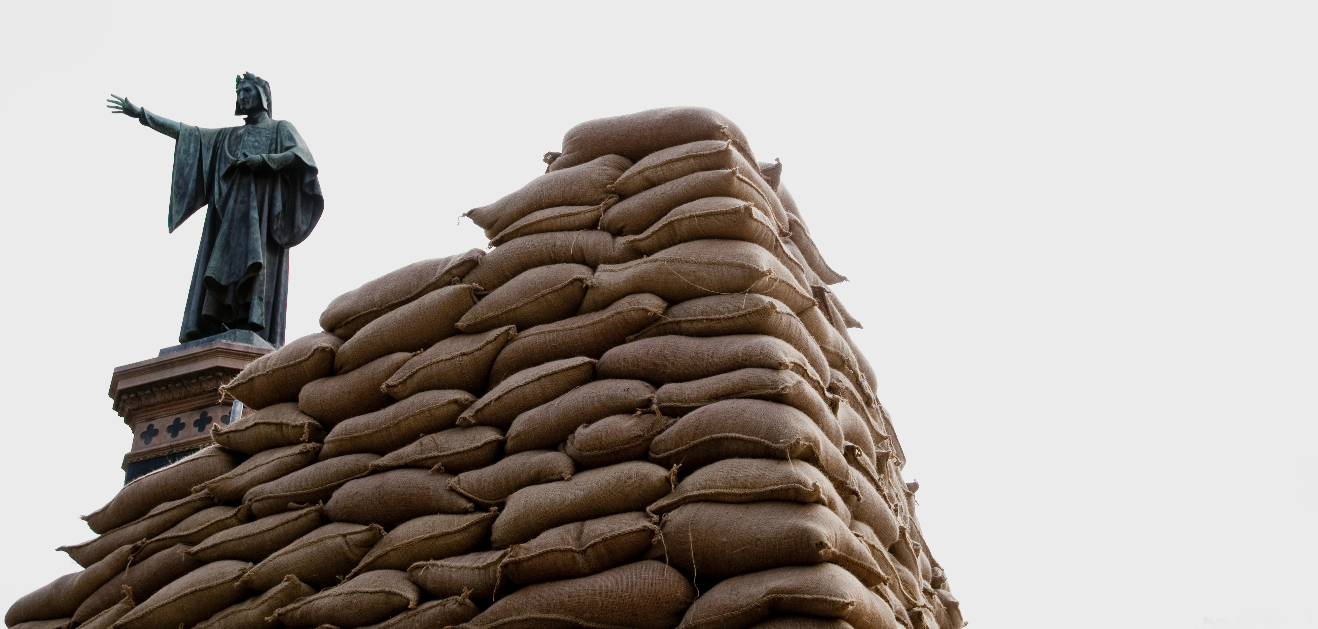 La statua di Dante a Trento con l'opera dell'artista Lara Favaretto